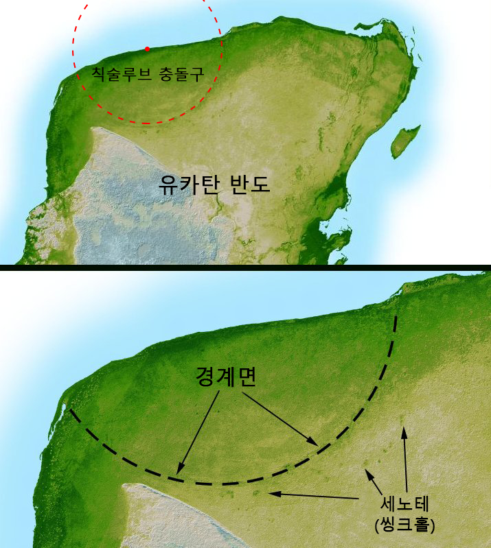 칙술루브 충돌구에 대한 설명